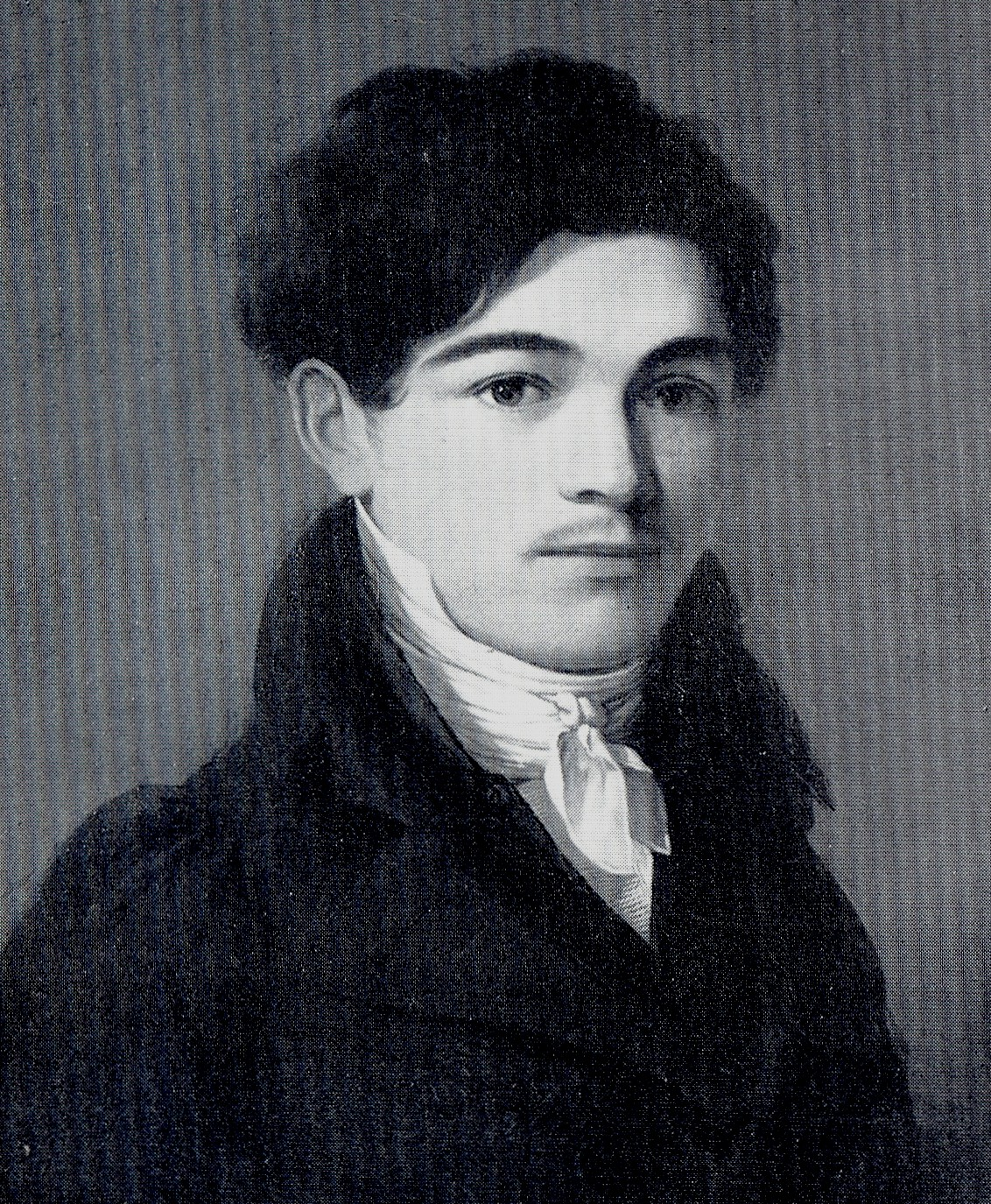 Der Heilbronner Papierfabrikant Adolf von Rauch. Ölgemälde